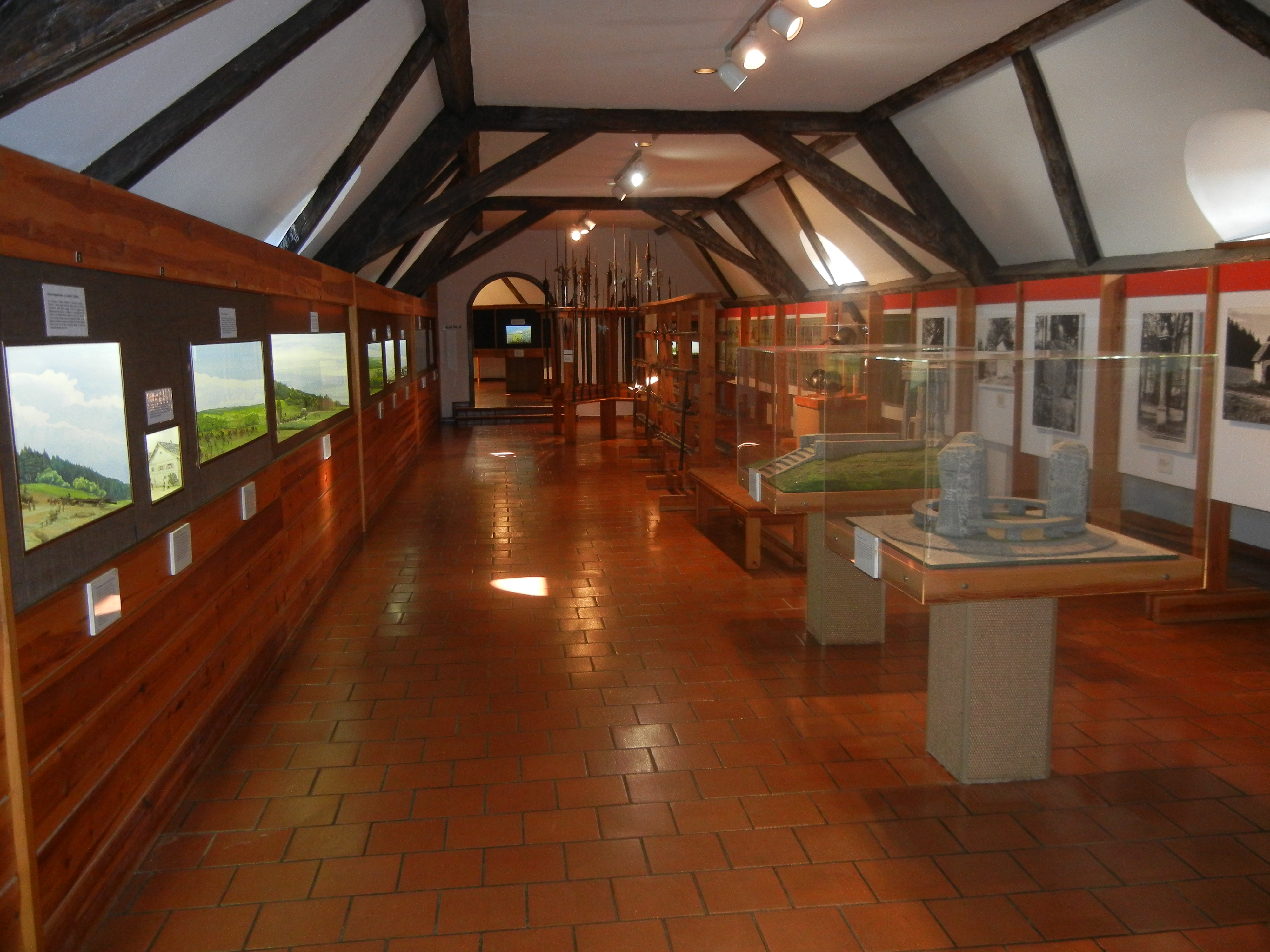 Bauernkriegsmuseum (erster Raum) im Schloss Peuerbach.